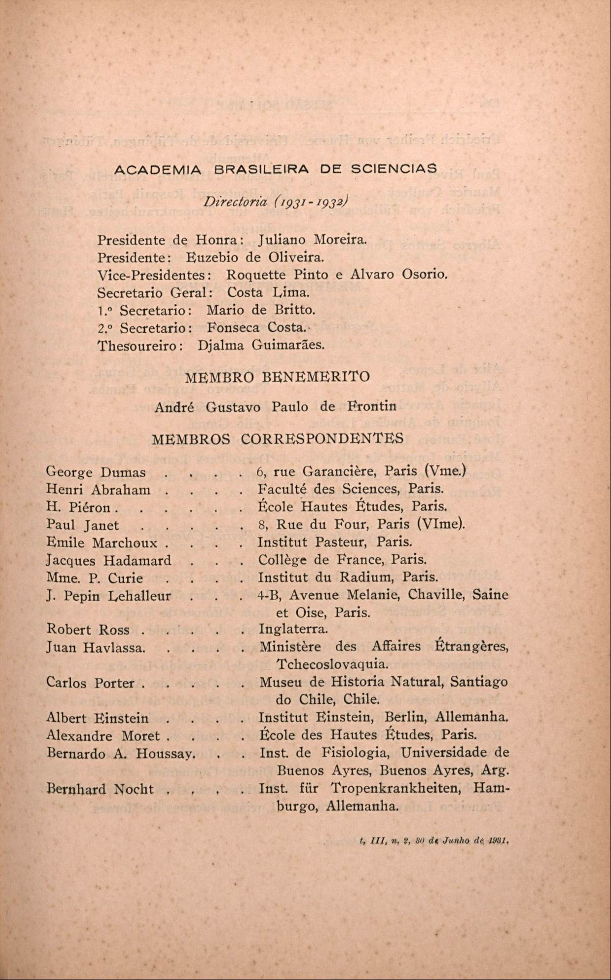 Publicação dos Anais da Academia Brasileira de Ciências (1931) com a lista de membro da diretoria e correspondentes para os anis de 1931-32. Diretoria: Juliano Moreira, Euzébio de Oliveira, Roquette-Pinto e Álvaro Osório, Costa Lima, Mário de Britto, Fonseca Costa e Djalma Guimarães. Destre os correspondentes: Georges Dumas, Émile Marchoux, Marie Curie, Albert Einstein, Alexandre Moret e Bernardo Houssay Disponível em